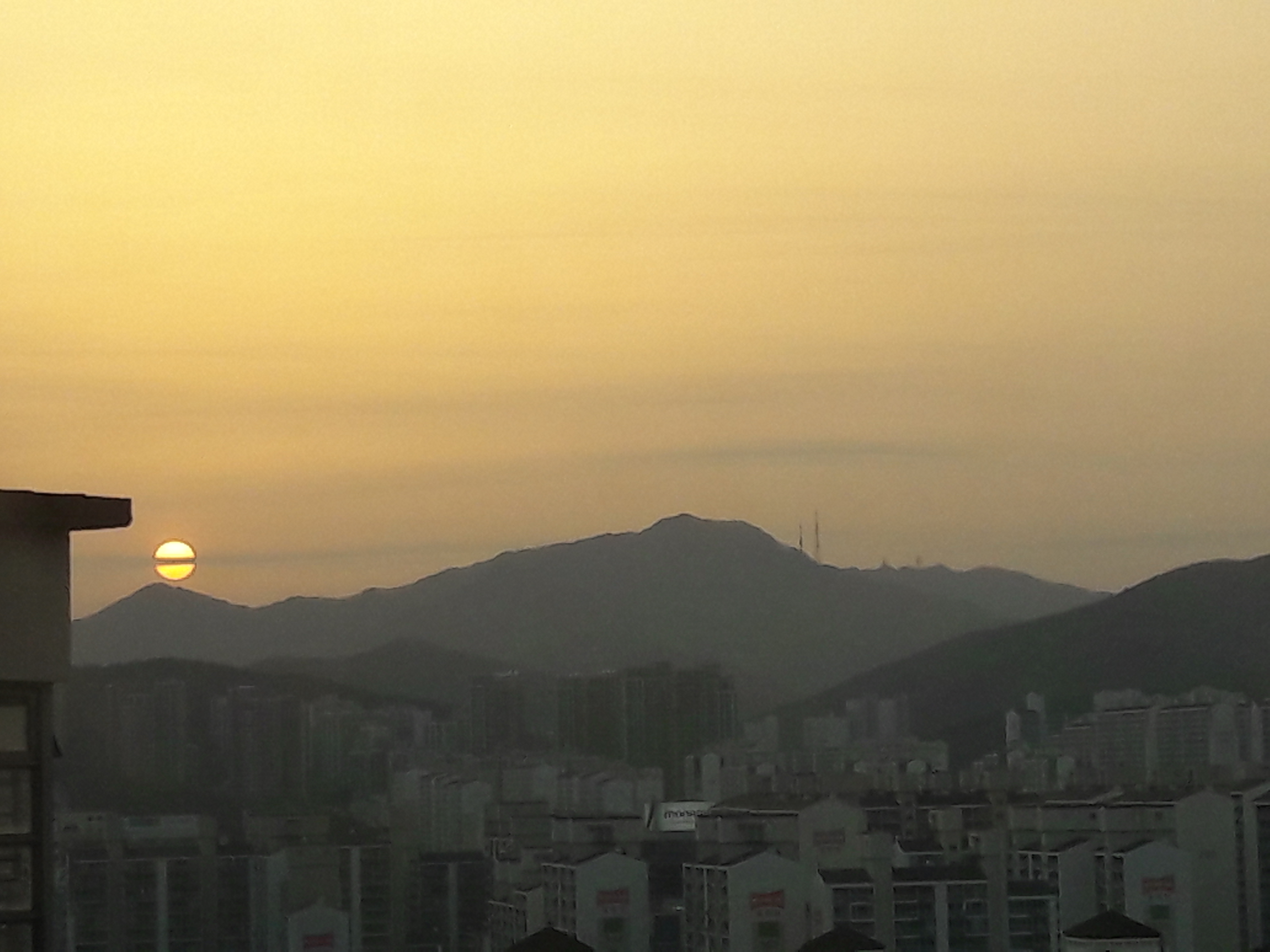 Mt. Gwanggyo from yong-in si